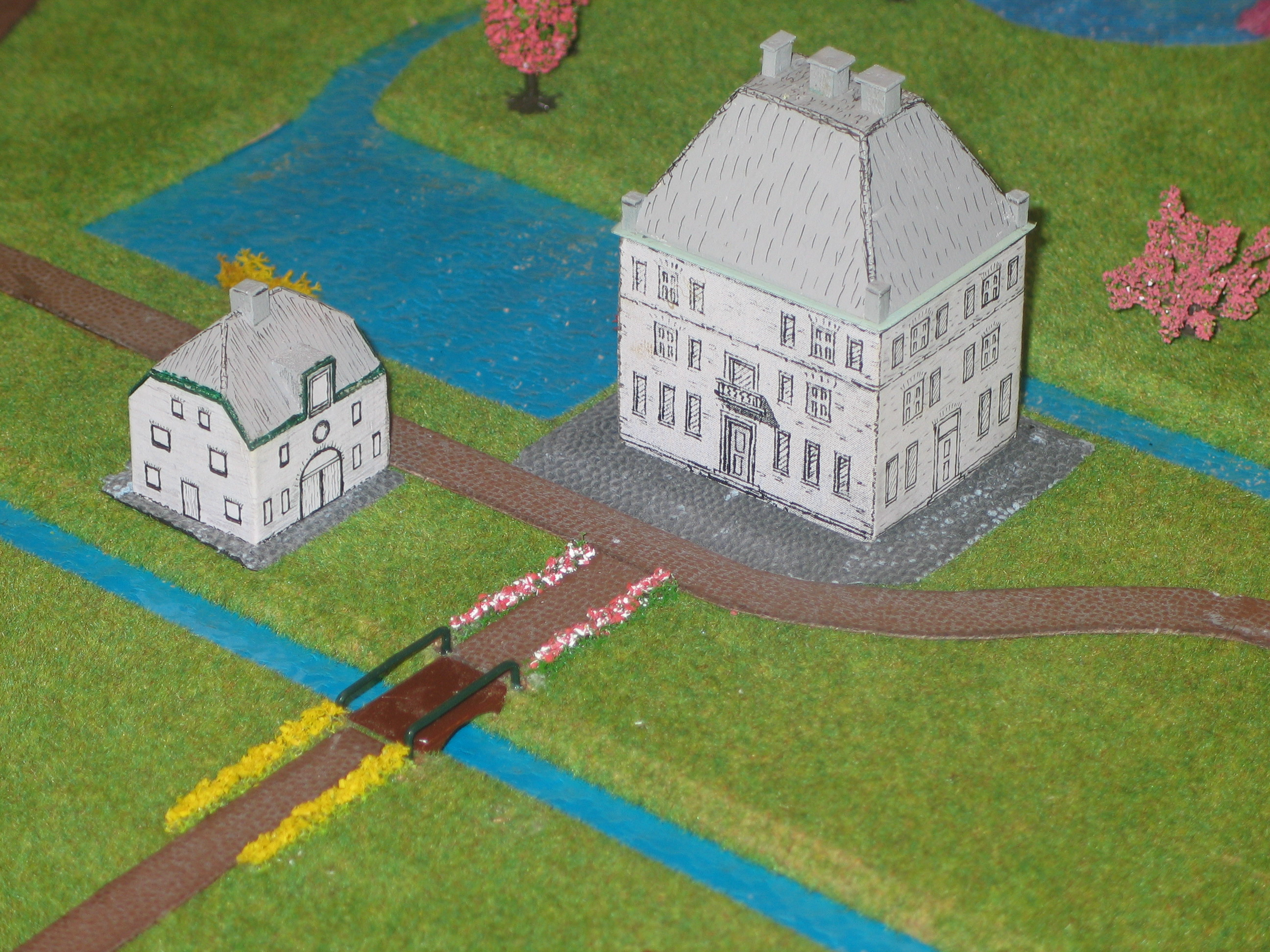 Eigen gemaakte foto